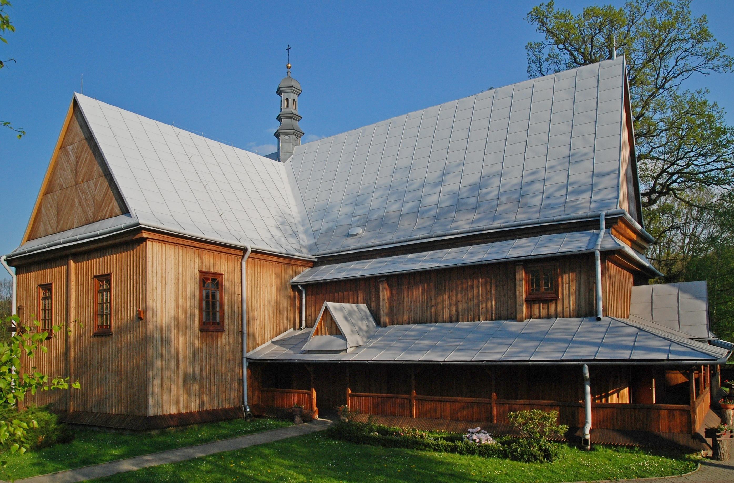 wieś Brzeziny (województwo podkarpackie)